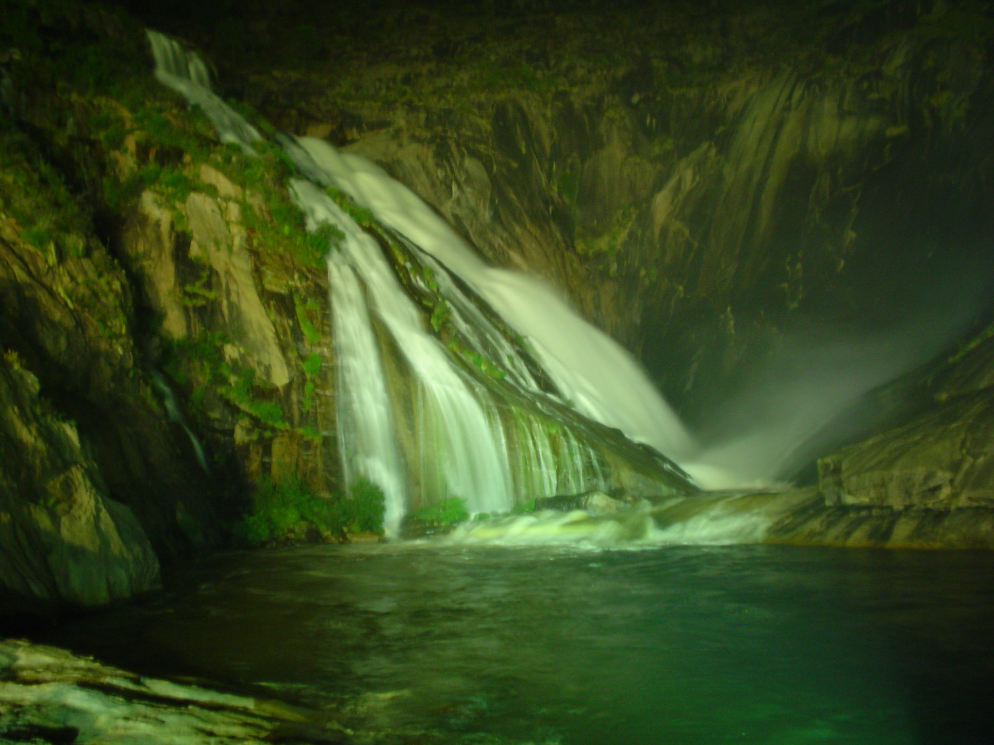 Fervenza do Ézaro pola noite